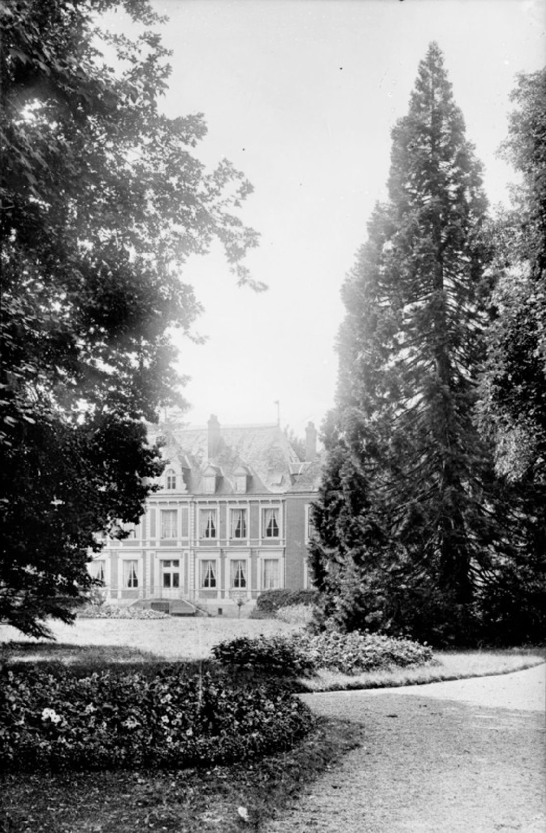 Château de l'Abbaye à Arques-la-Bataille, ancienne abbaye cistercienne